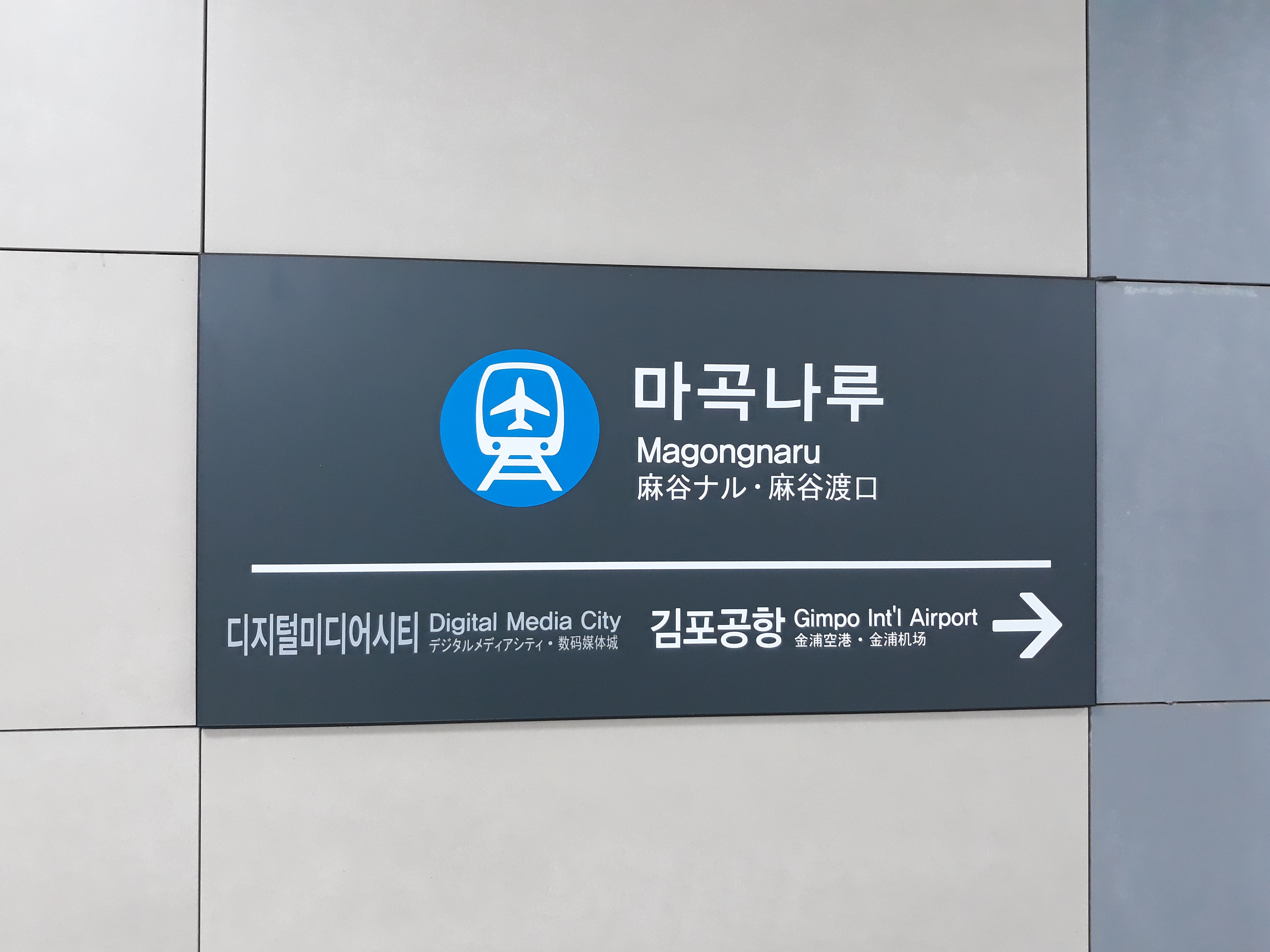 공항철도 마곡나루